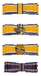 Eigen tekenwerk Robert Prummel